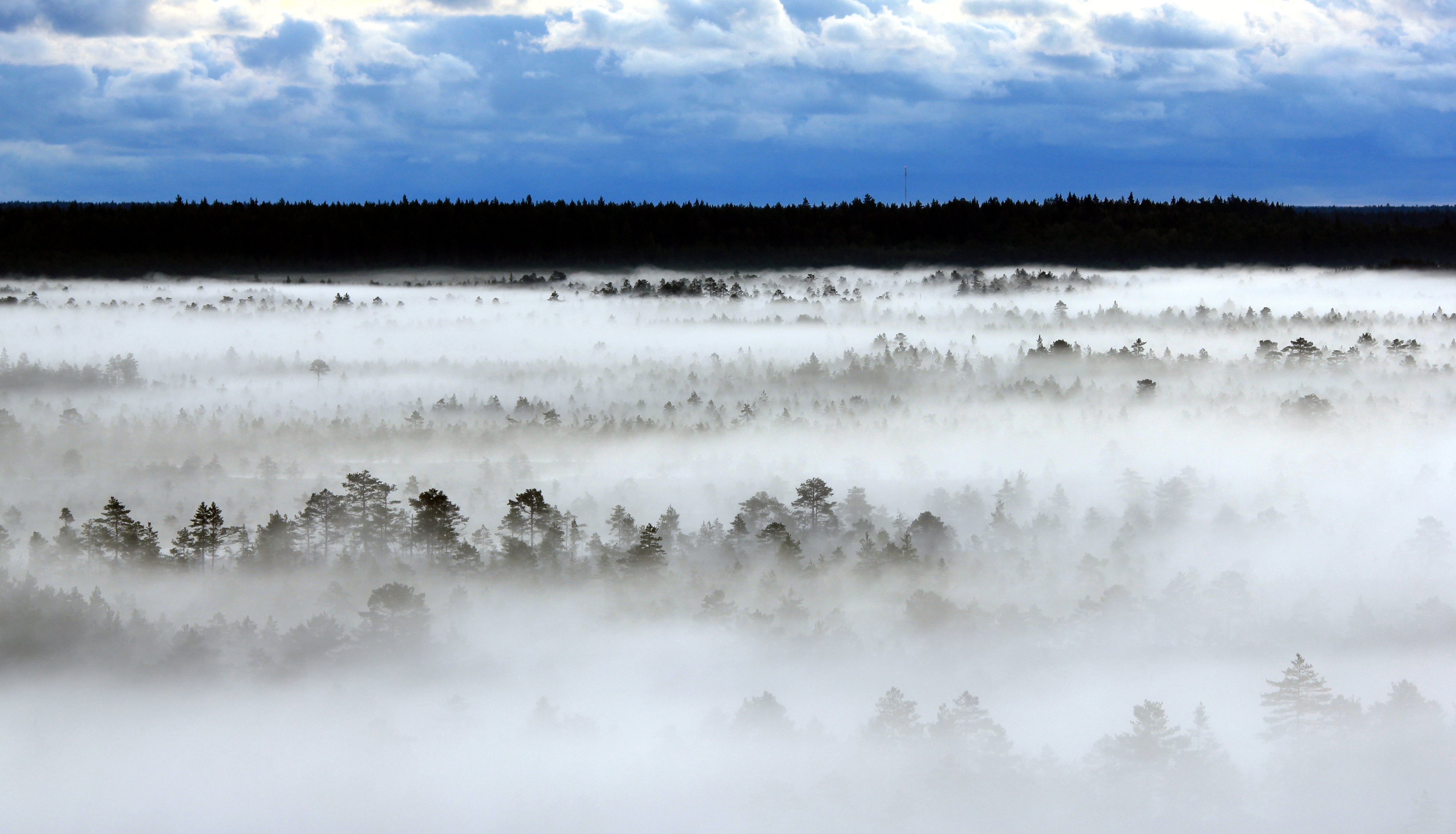 Päikesetõus Paukjärve vaatetornis koos lummava uduvaibaga.